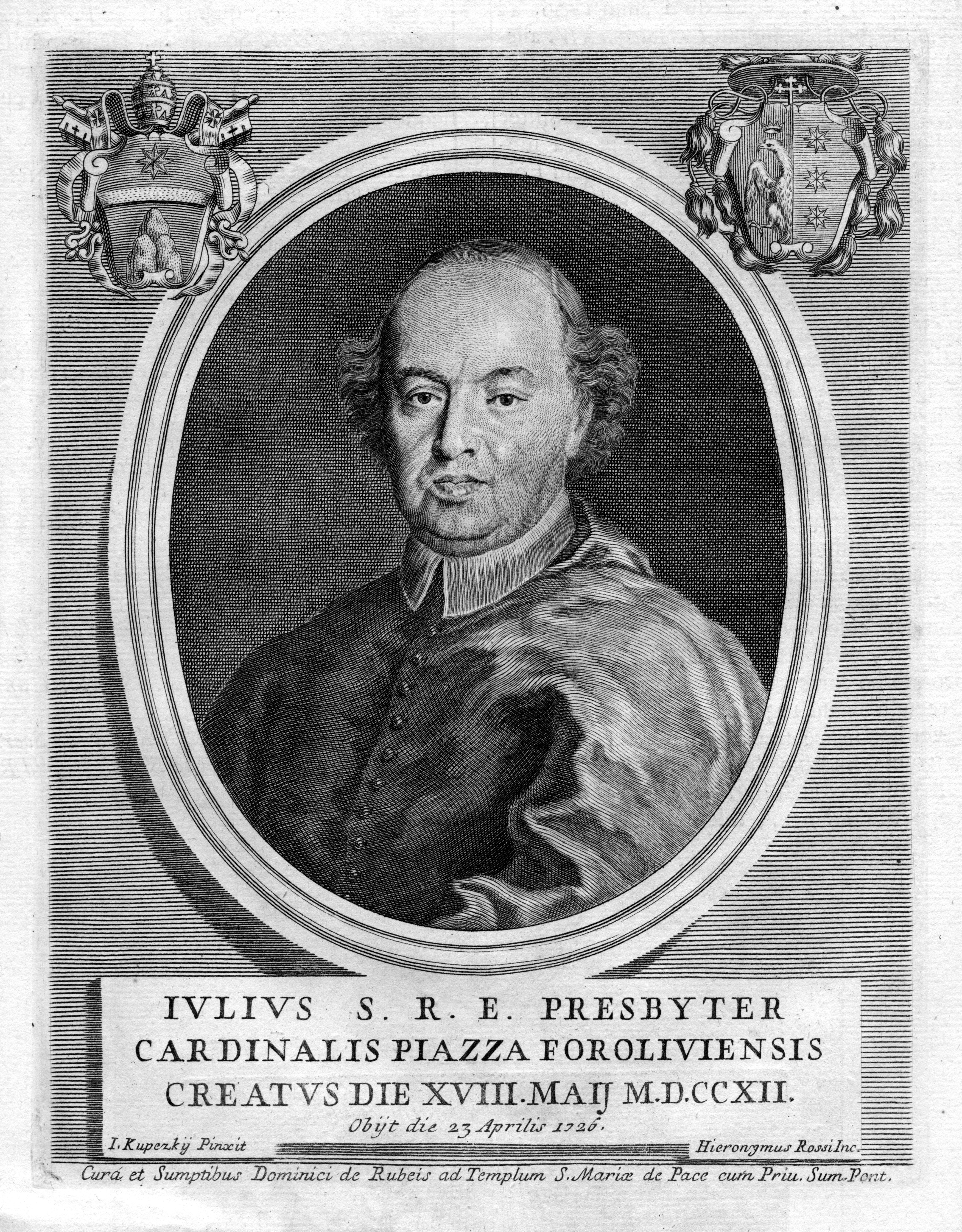 Portrait de Giulio Piazza (1663-1726)